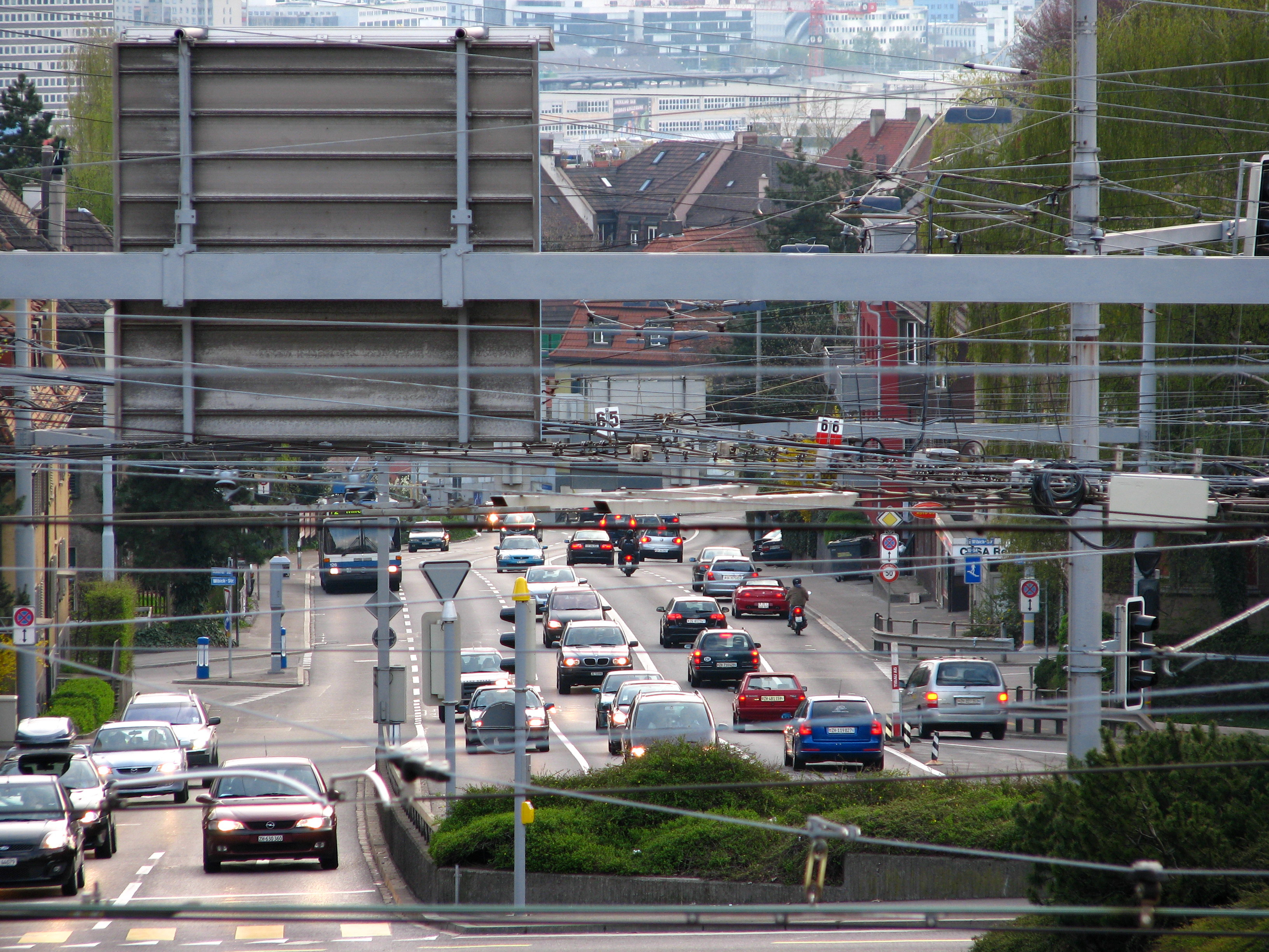 Rosengartenstrasse in Zürich as seen from Bucheggplatz